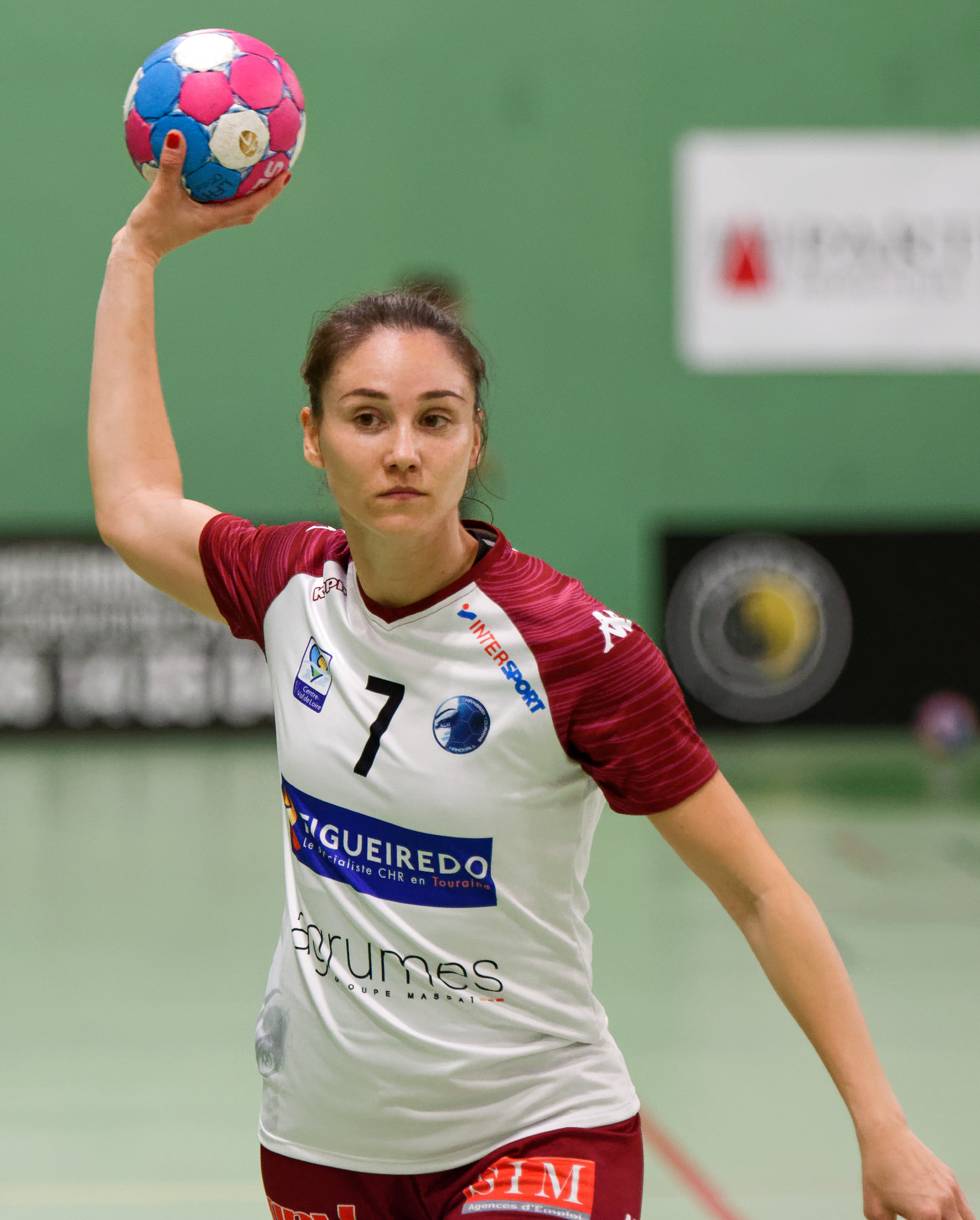 Match de LFH entre Paris 92 et Chambray. A Meudon la forêt, le 10 octobre 2018.